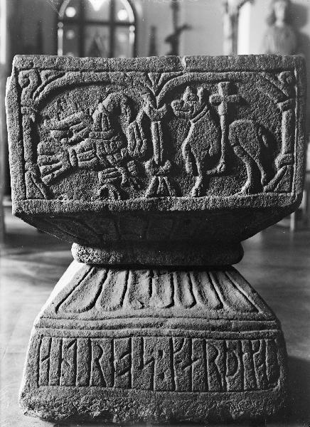 Dopfunt, romansk. Kategori: (04) Dopfuntar Dopfunt, romansk.